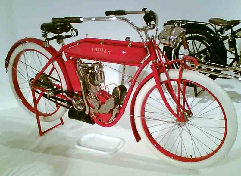 Indian 1911